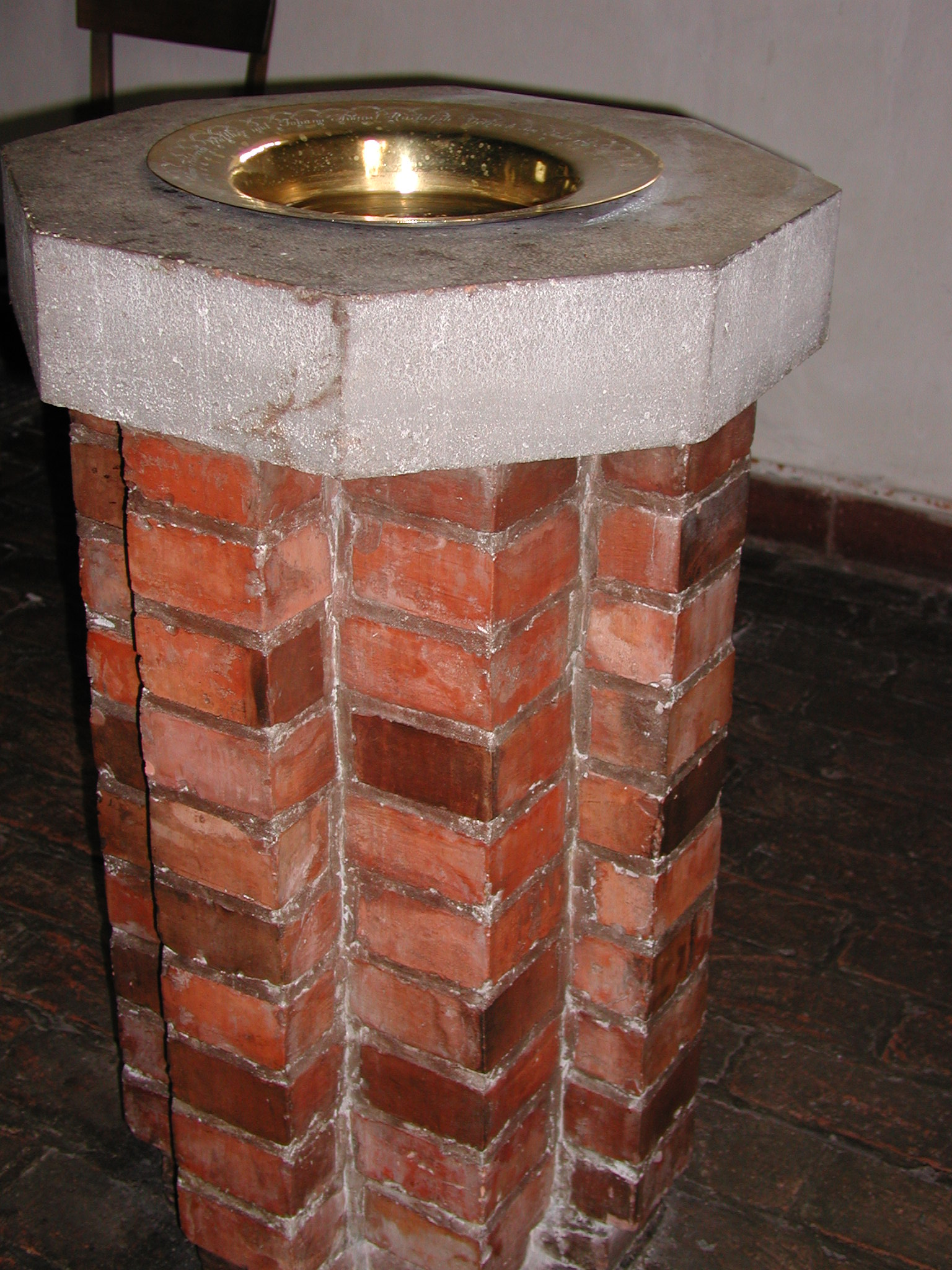 Das gemauerte Taufbecken mit Schale